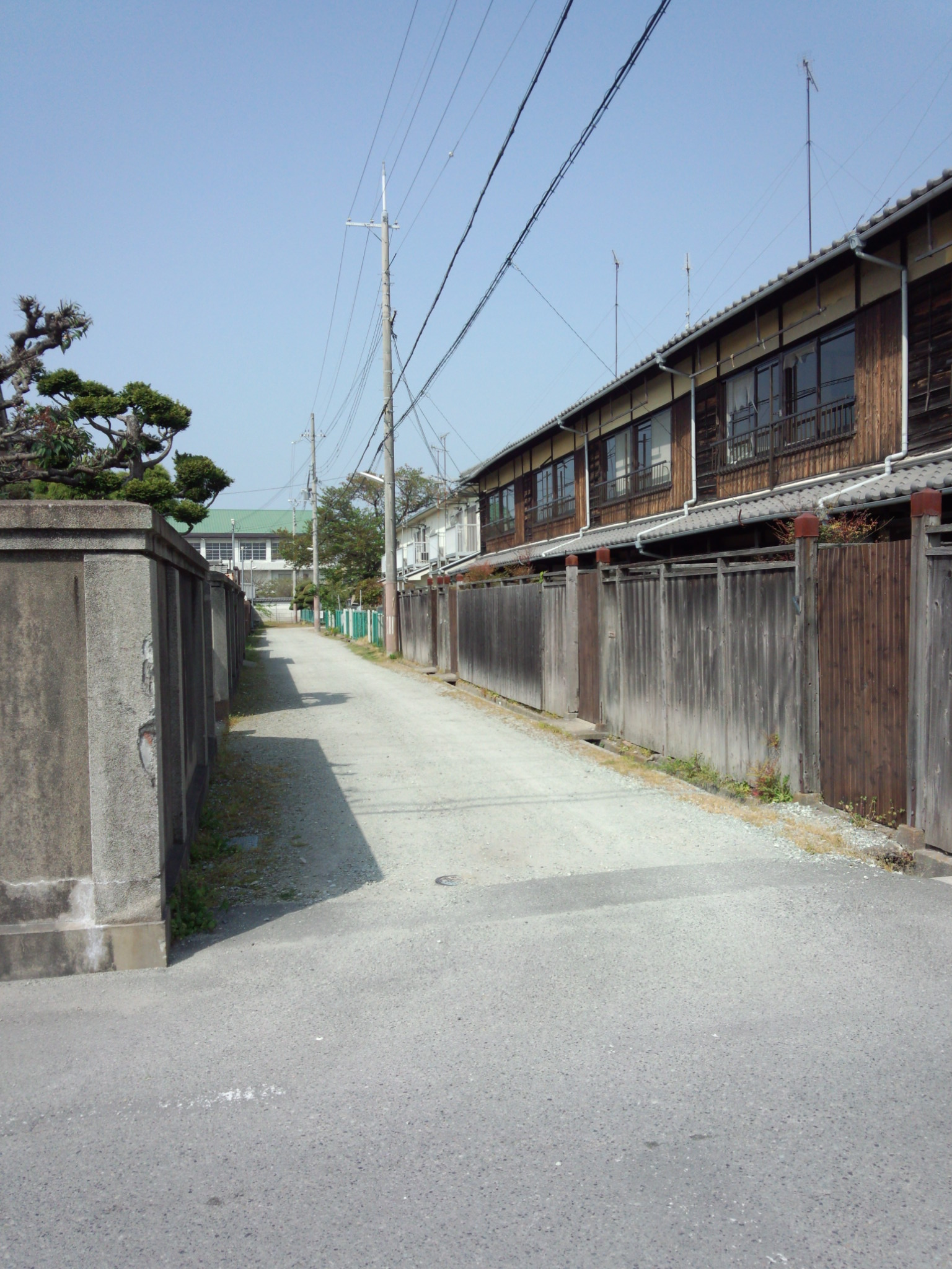 日毛社宅（加古川市）